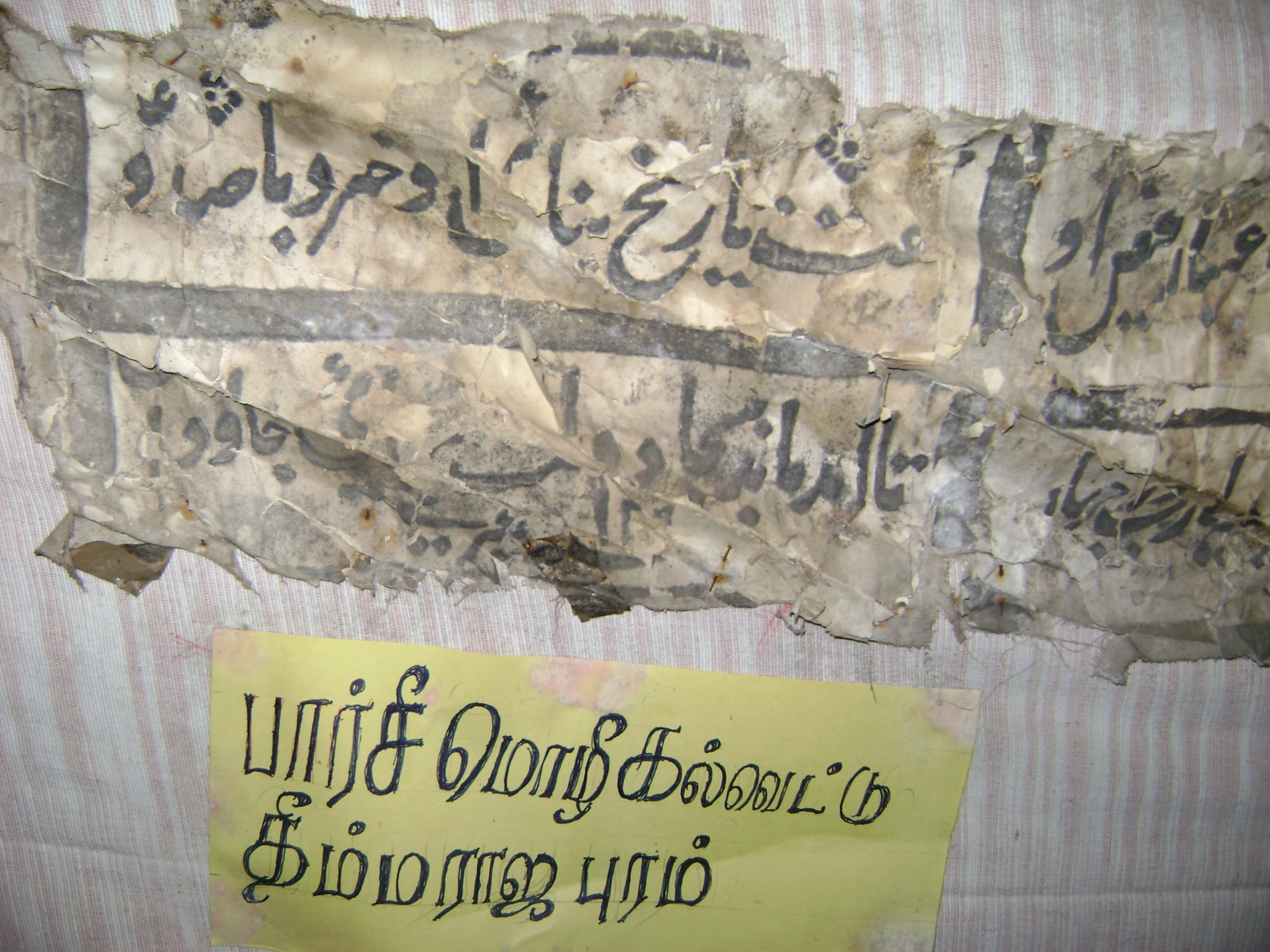 பார்சி மொழி கல்வெட்டுகள், குற்றாலம் தொல்லியல் அருங்காட்சியகம்.